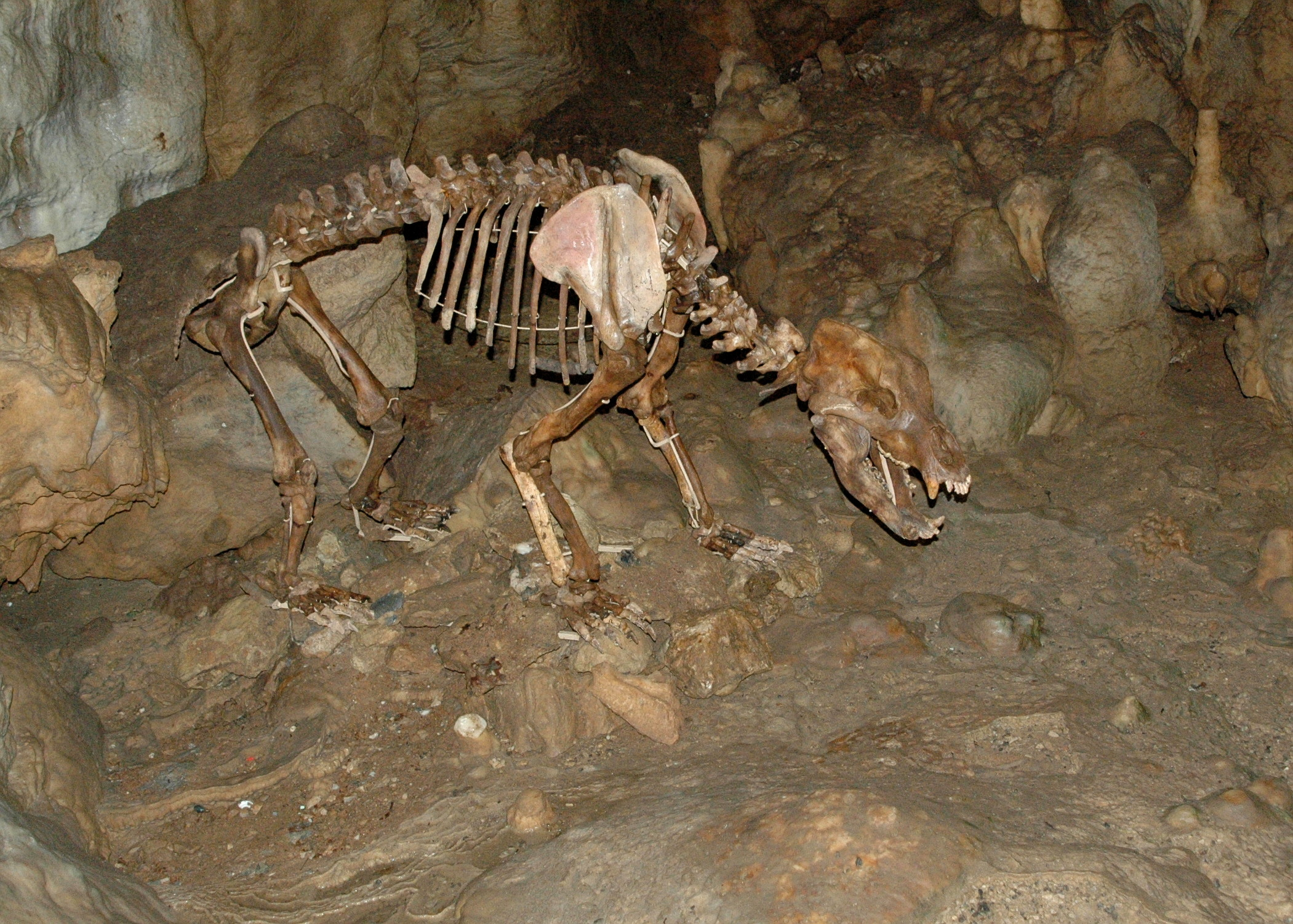 Ursus spelaeus, Bärenhöhle, Sonnenbühl, Germany